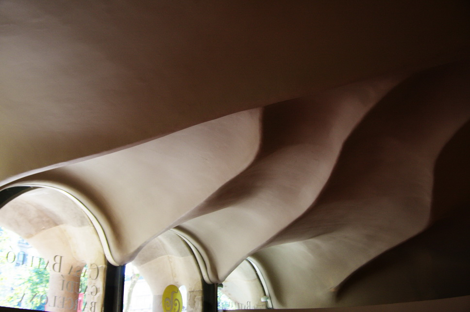 Sostre de la planta baixa de la casa Batlló (Barcelona-Catalunya). Es va fer a les restauracions de l'any 1989 per a aprofitar millor la llum solar